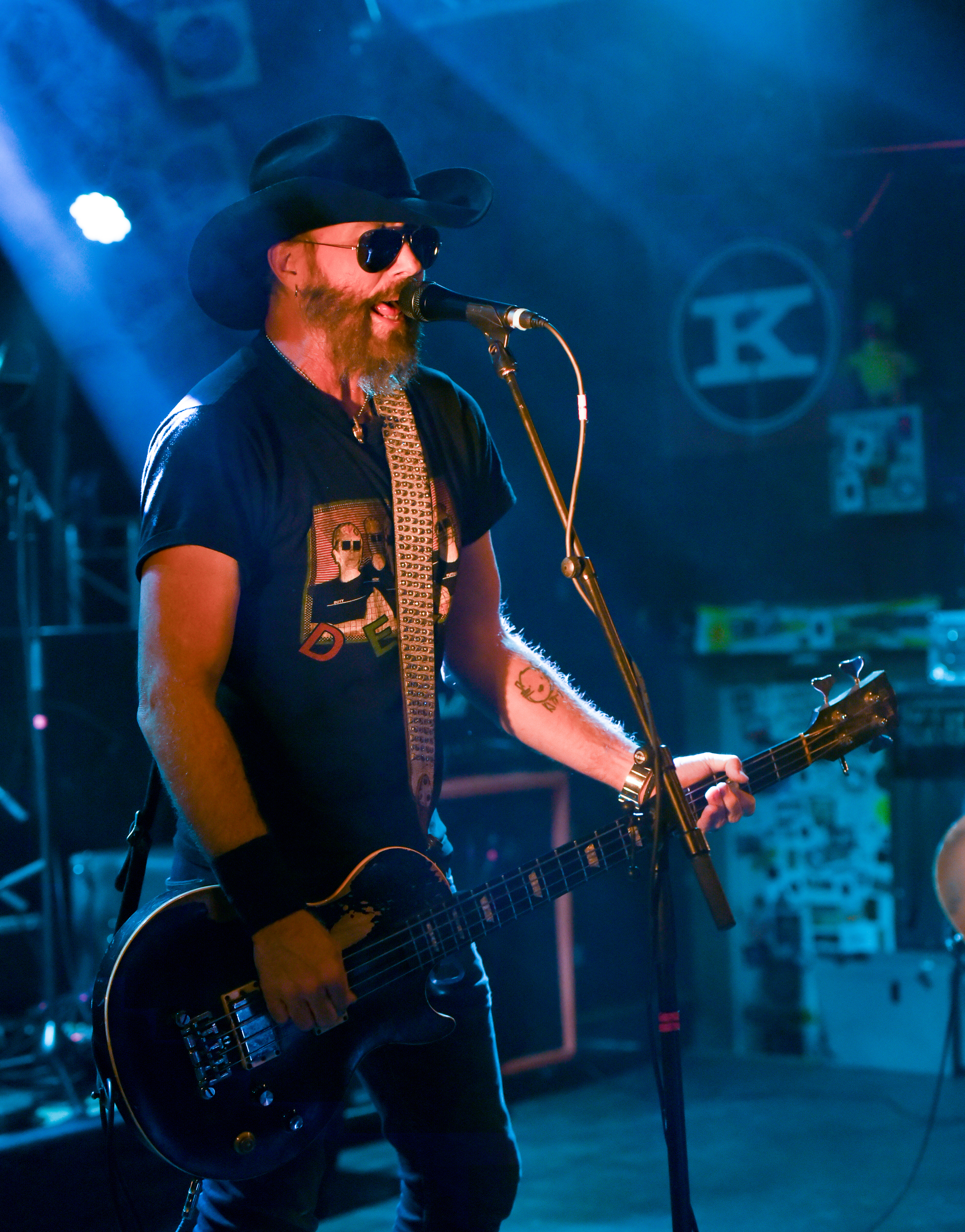 Supersuckers beim Metal Monday 2017